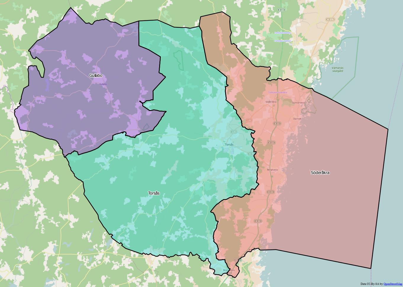 Distriktsindelningen i Torsås kommun World file: 51.29663222783734966 0 0 -51.29663222783734966 1741754.55091496789827943 7665969.65446078032255173